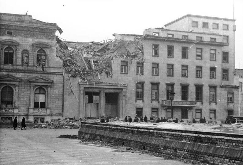 Berlin, Reichskanzlei, Bombenschäden ADN-ZB/Archiv II. Weltkrieg 1939-45 Bombenschäden in Berlin durch alliierte Luftangriffe 1945: Wirkung einer Sprengbombe in der Front zum Wilhelmplatz der Neuen Reichskanzlei. (Aufnahme entstand vor dem 22.3.1945) Kommentar: Es handelt sich nicht um die Neue Reichskanzlei: links das alte Palais Borsig, rechts der 1928-1930 errichtete Erweiterungsbau der Alten Reichskanzlei (rechts anschließend).